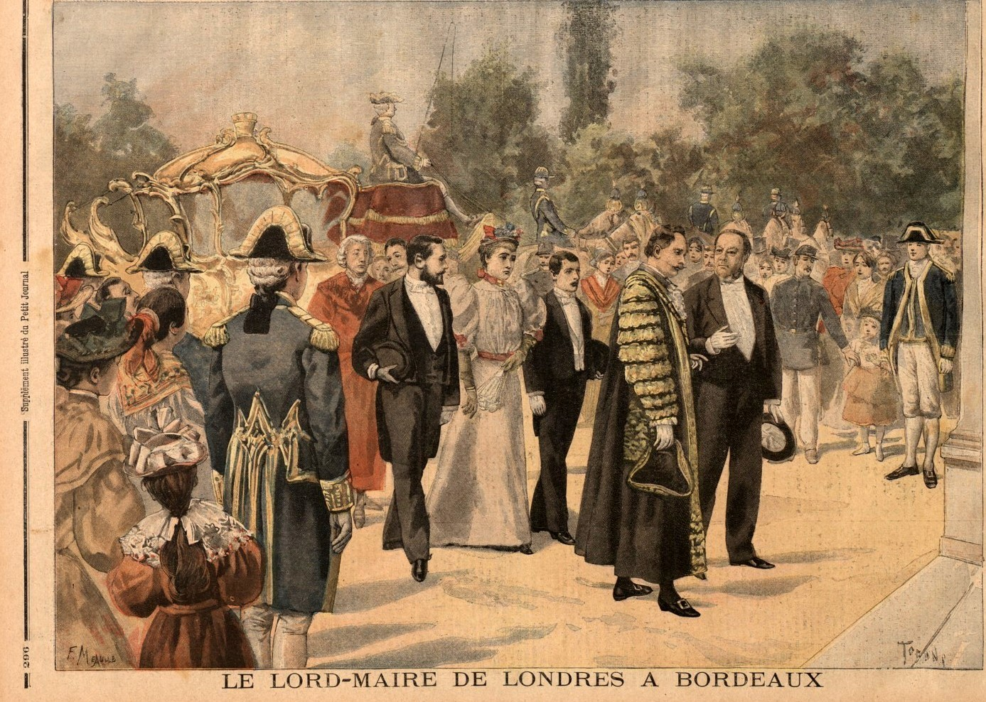 Le Lord Mayor de Londres à Bordeaux